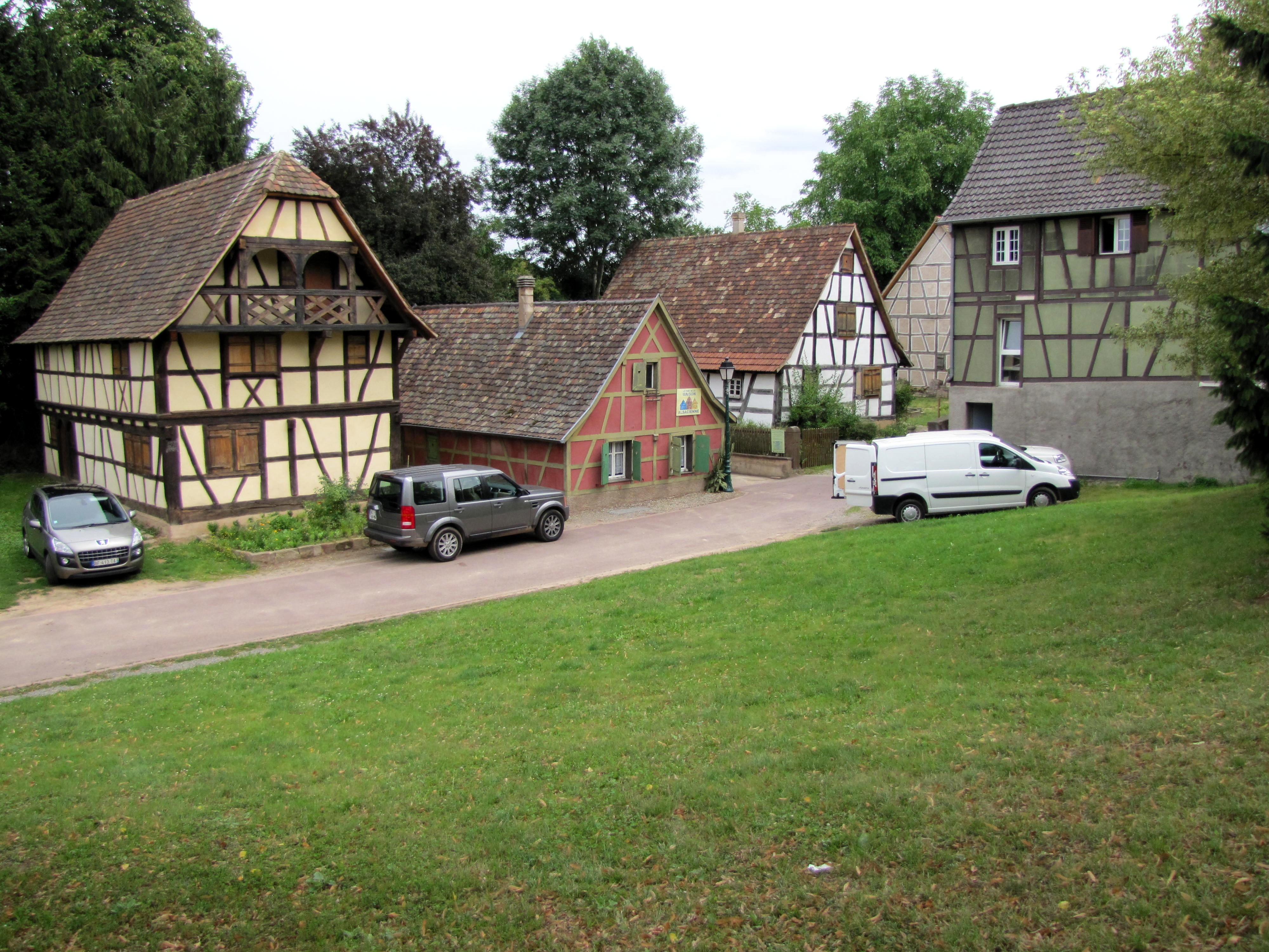 Alsace, Bas-Rhin, Reichstett, Parc de la Maison Alsacienne (Écomusée), rue du Terrain.